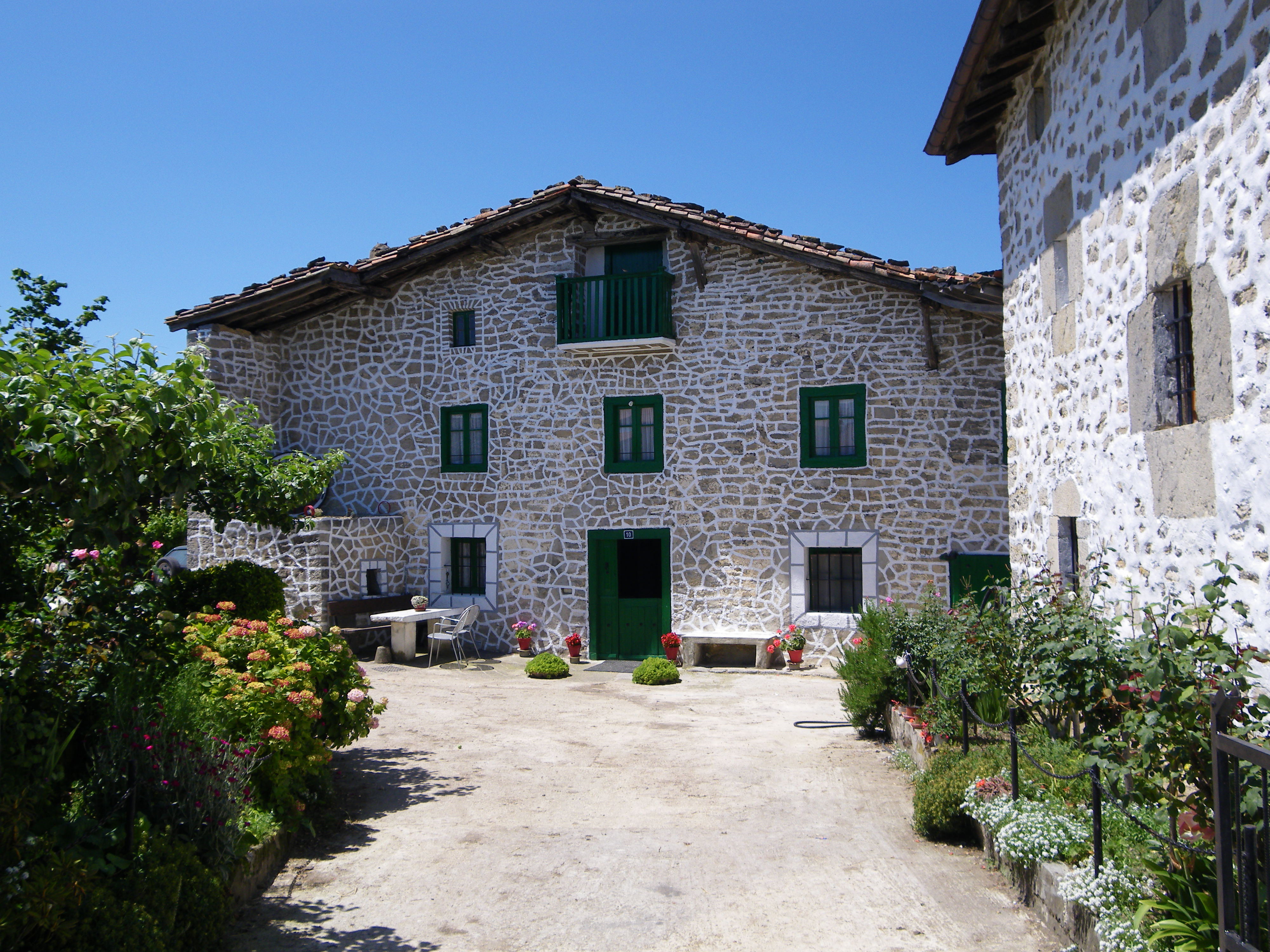 Iturribide kaleko baserri baten aurrealdea, Untzaga, Urkabustaiz, Araba, Euskal Herria.